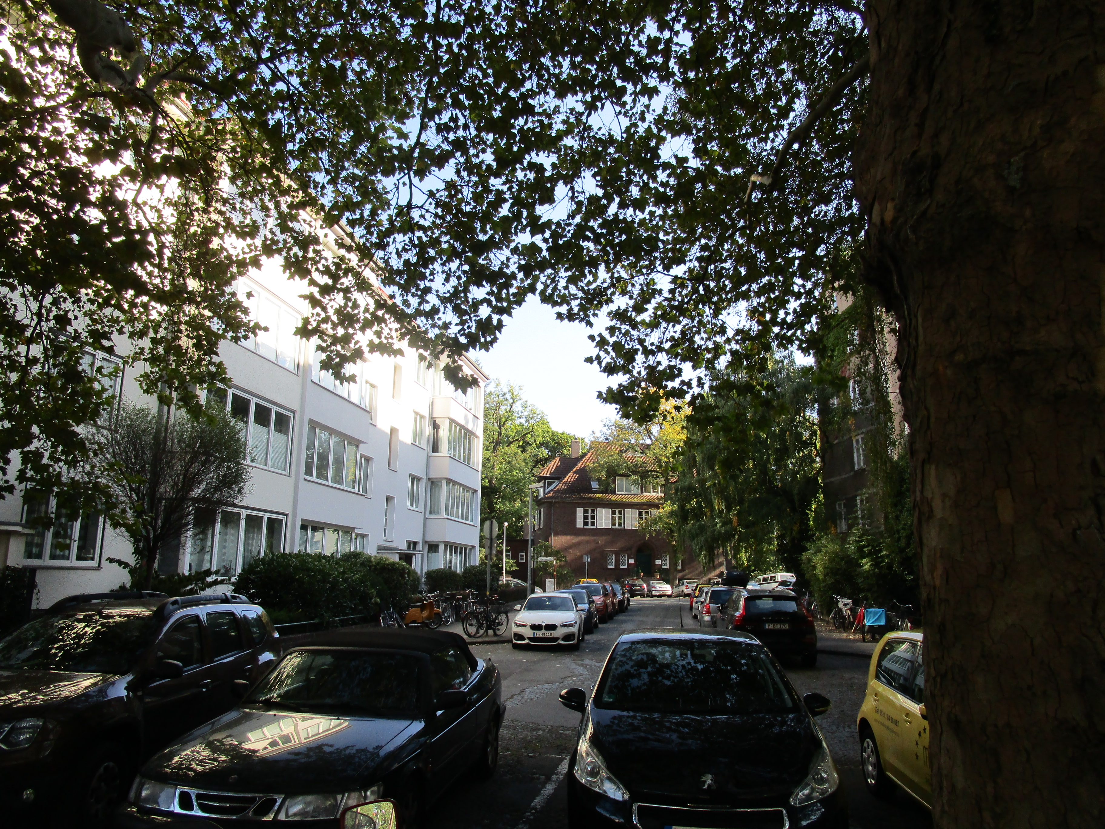 Vier Grenzen ist der Name einer Straße in Hannovers Stadtteil List ...